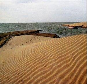 Fotografía tomada durante el período de trabajo en el Programa para rehabilitar las infraestructuras dañadas por el Fenómeno El Niño, del cual fui Jefe de Asistencia Técnica. Autor: Alfredobi